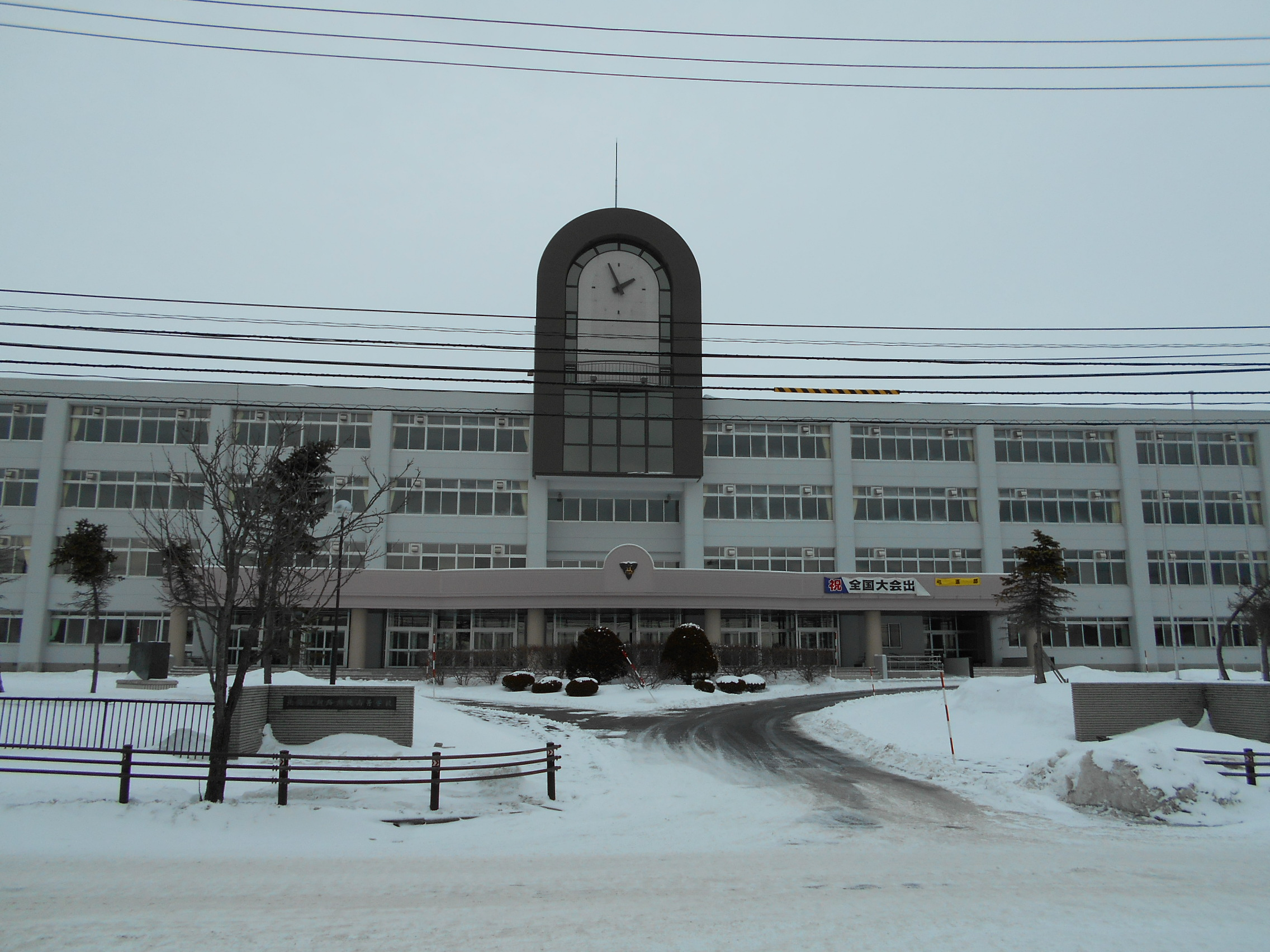 北海道釧路湖陵高等学校